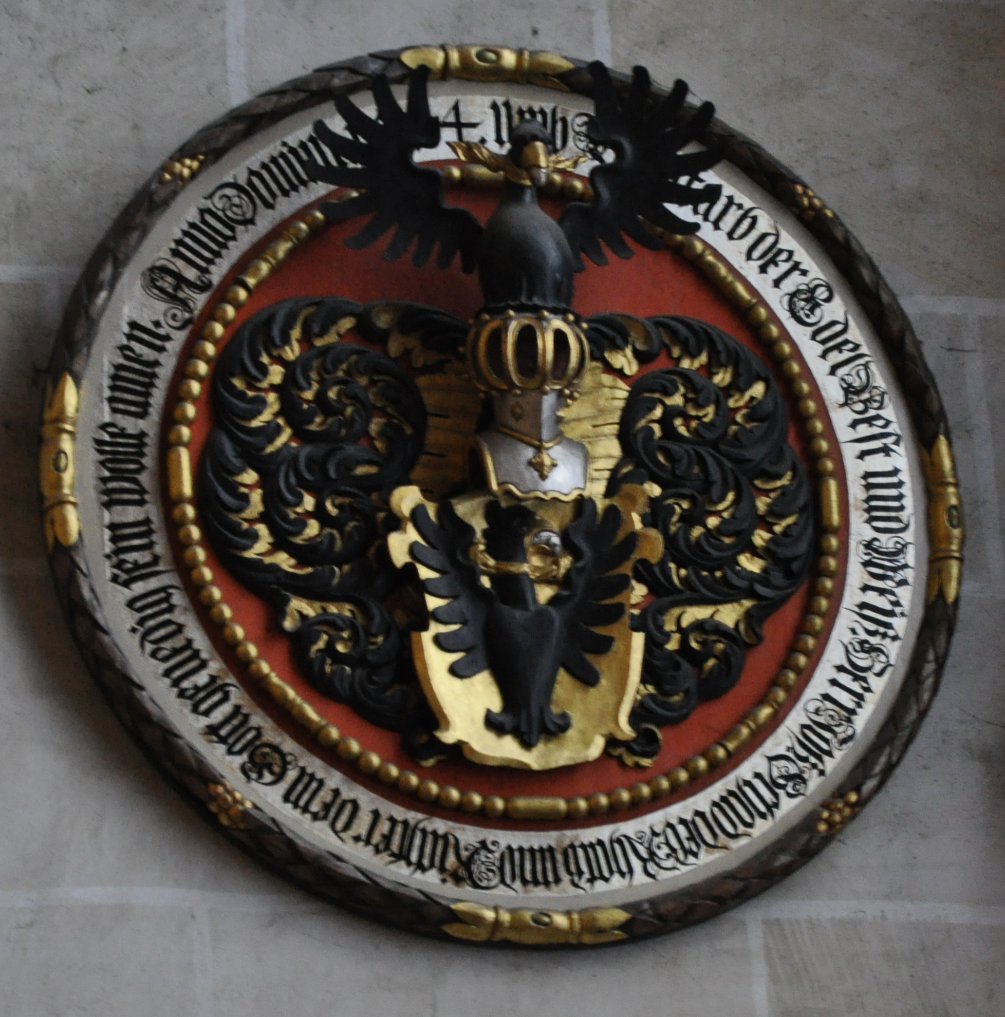 Ulm, Ulmer Münster, Totenschild Jos Schad († 1544) "Anno Domini 1544 […] starb der EdelVest vnd Weiß Herr Joß Schad deß Rhats vnd Richter dem Gott genedig sein wolle amen."